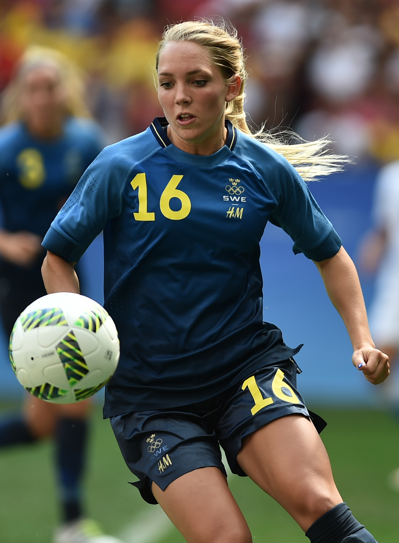 Estádio Nacional de Brasília Mané Garrincha, Brasília, DF, Brasil, 12/8/2016. Estados Unidos e Suécia jogam nesta sexta-feira (12), no Estádio Mané Garrincha, pelas quartas de final do futebol feminino na Olimpíada 2016.